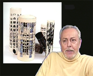 Portrait de Constantin Xenakis